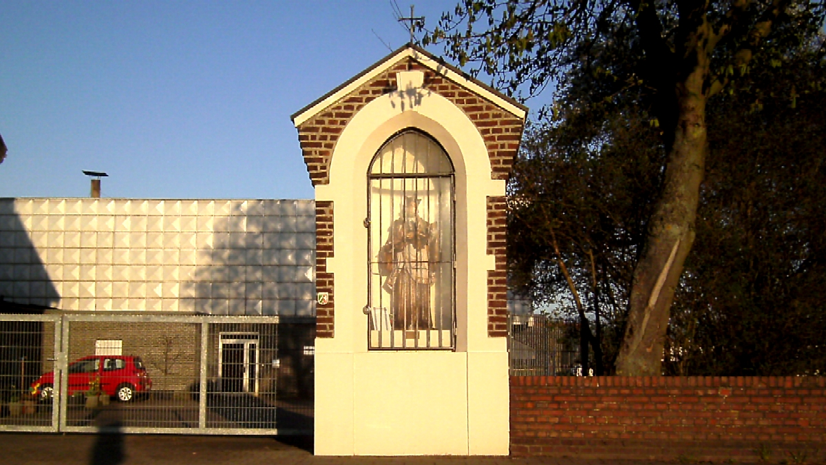 Das St.Nepomuk-Heiligenhäuschen an der Viersener Straße in Willich-Vennheide im nordrhein-westfälischen Kreis Viersen.